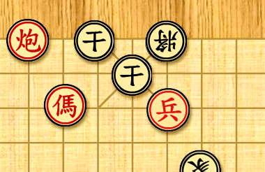 Self-drawn